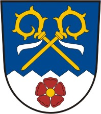 Přeštěnice